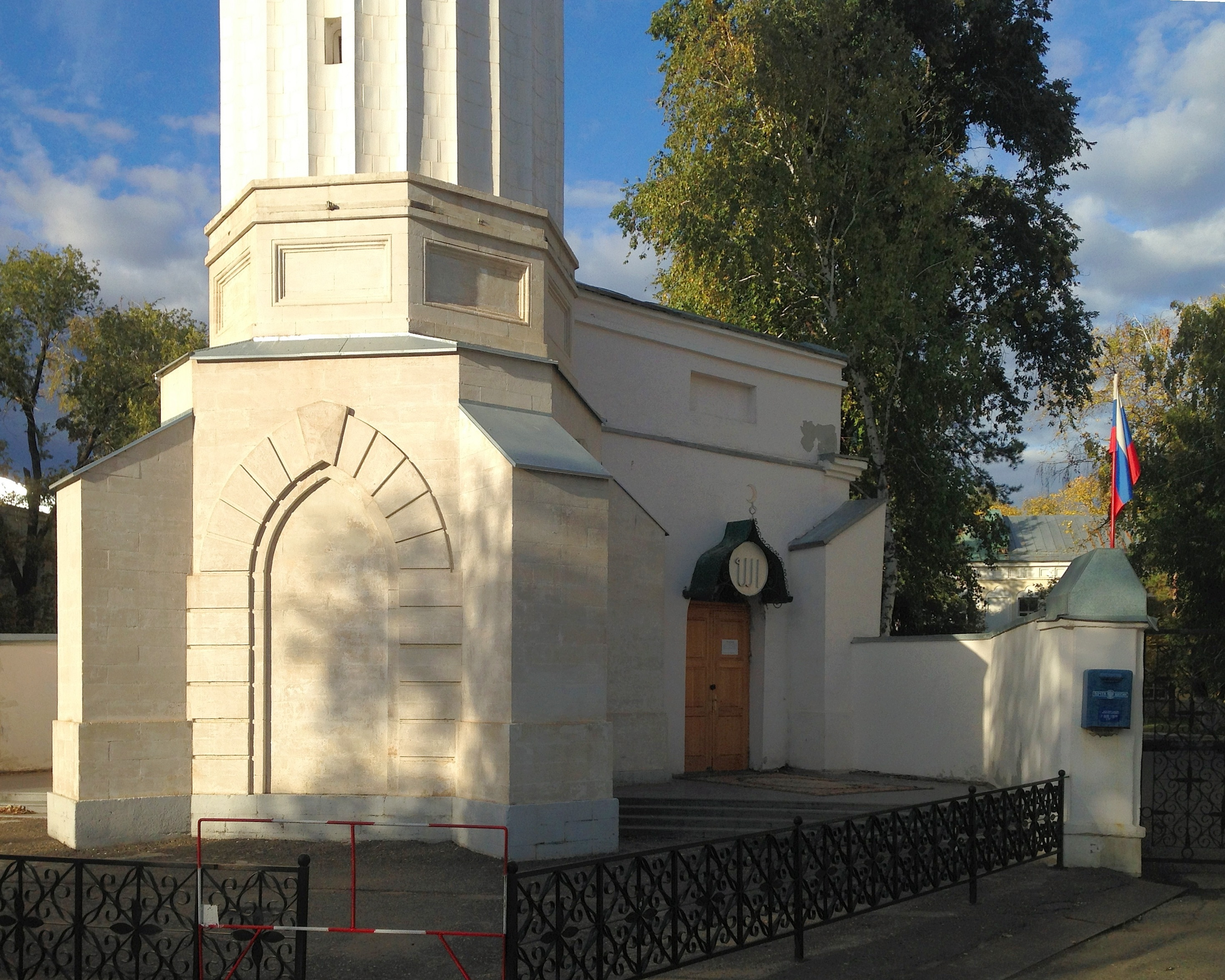 Мечеть с минаретом (Оренбургская область, Оренбург, Парковый пр., 6)